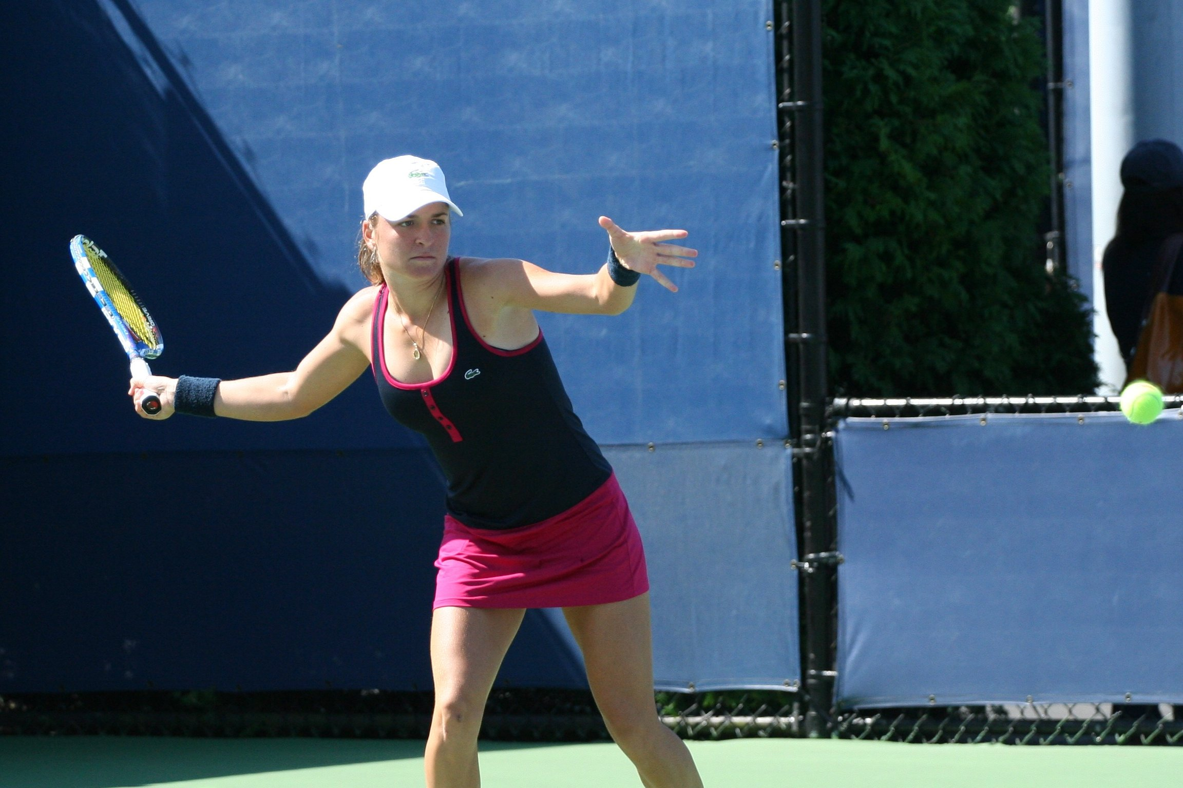 U.S. Open Wednesday, Sept. 2, 2009